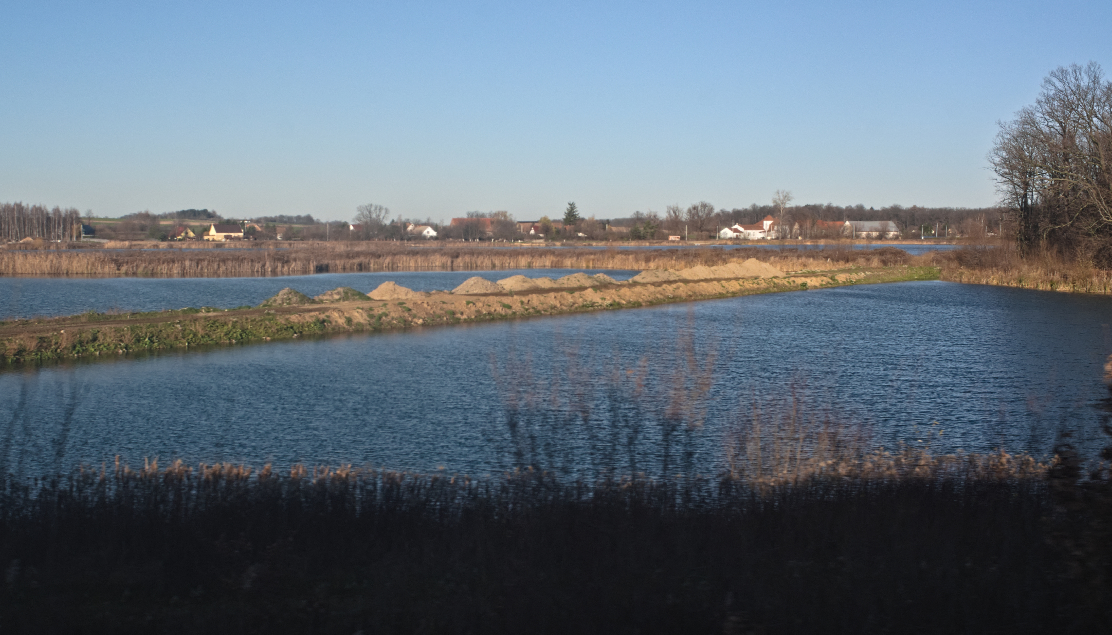 stawy nad Strzegomką, koło kopalni odkrywkowej Stróża, w tle wieś Stróża (gmina Mietków), widok z południa, z okna pociągu do Wrocławia